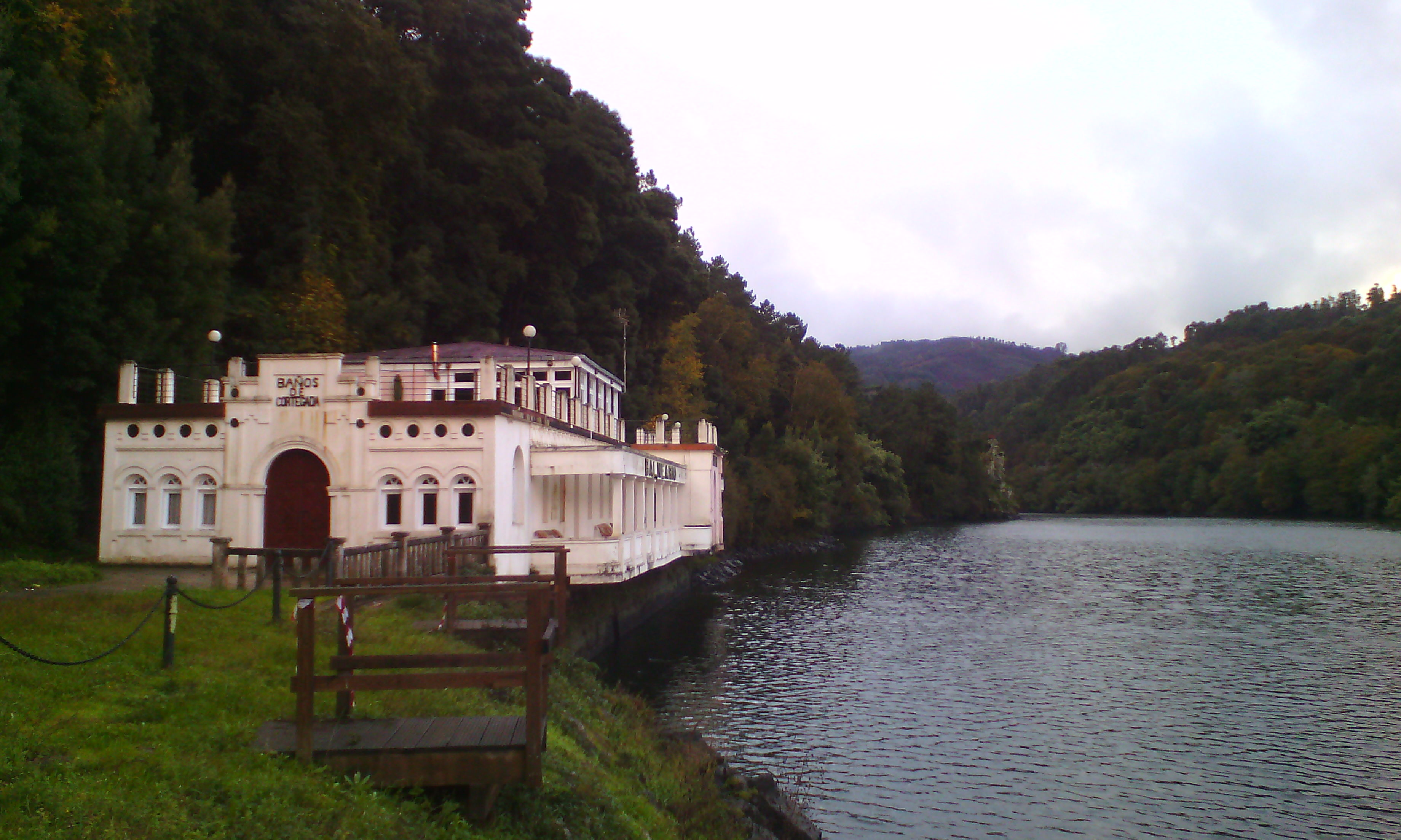 Balneario en Cortegada, a pé do río Miño